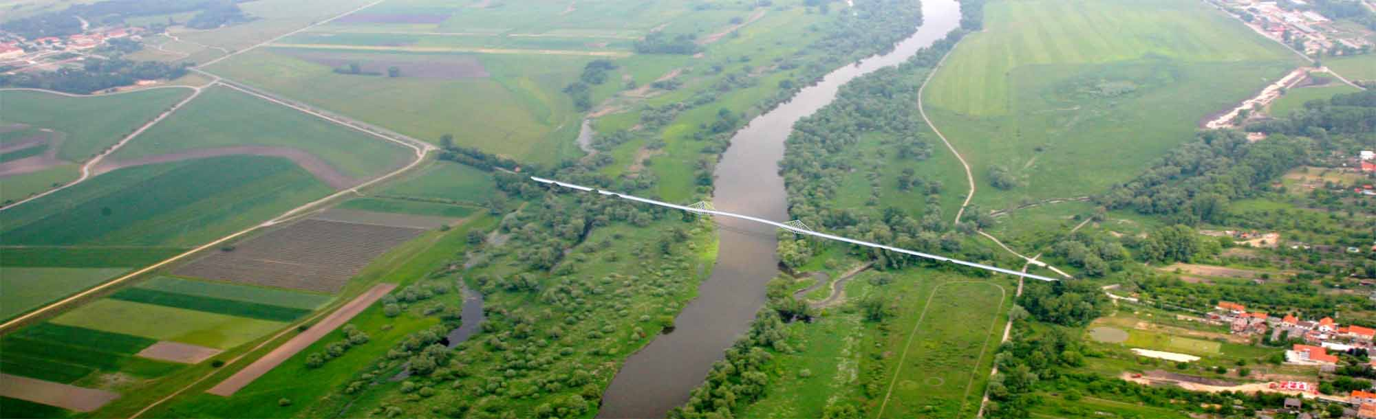 Cyklomost Devínska Nová Ves - Schlosshof - Letecký pohľad